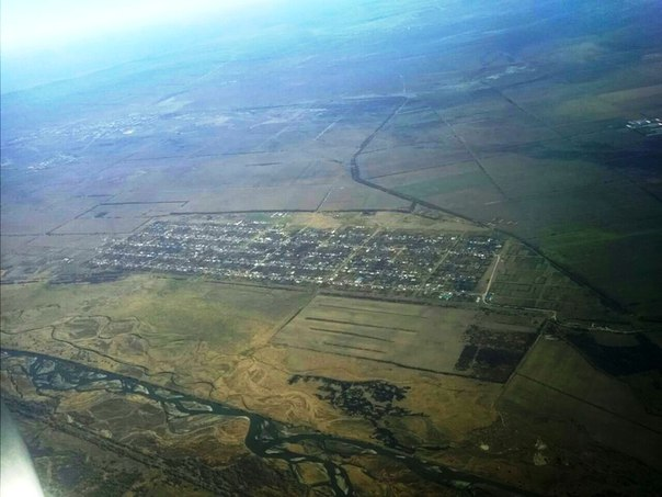 Общий вид на село Плановское и рукав реки Терек